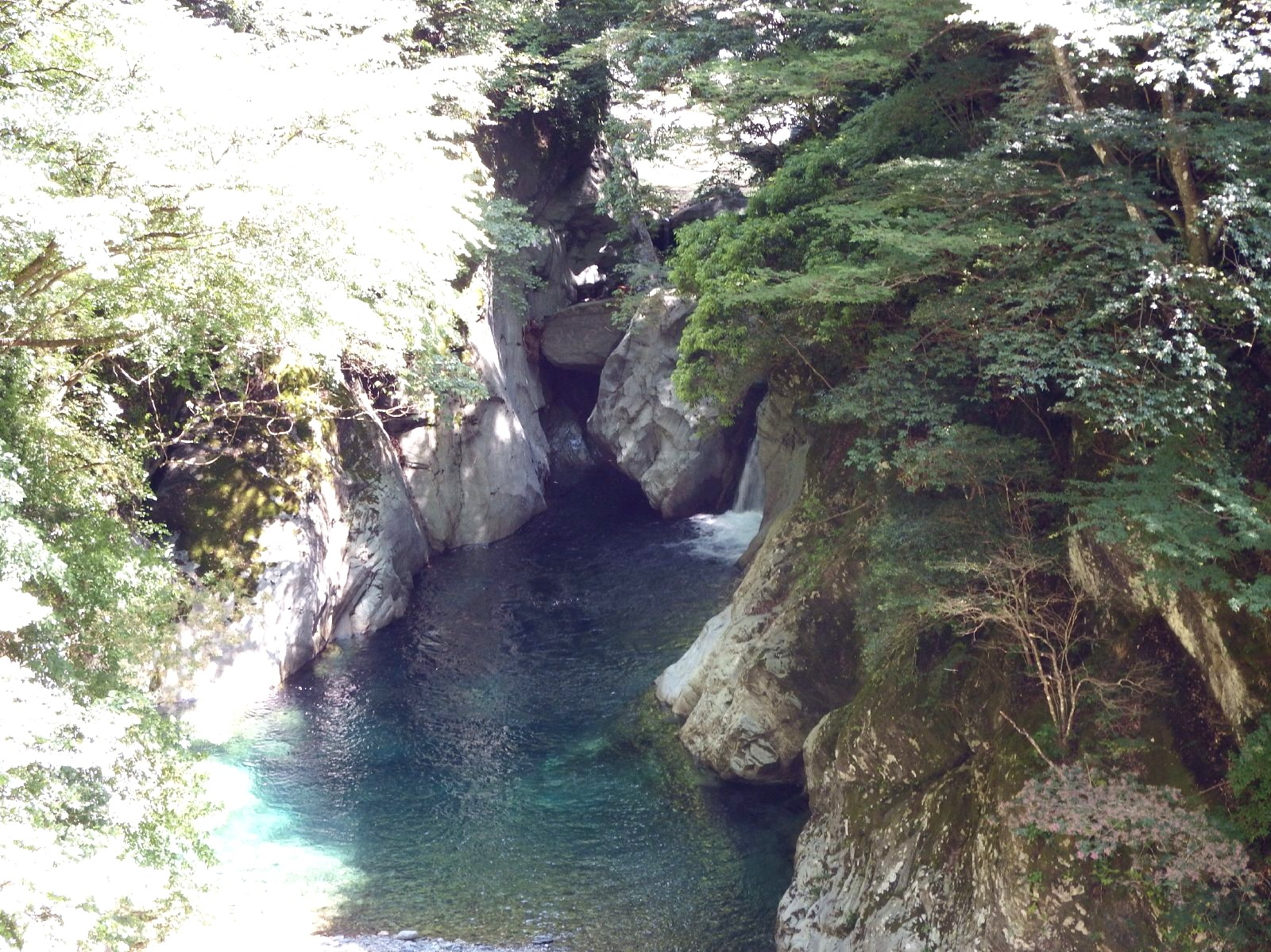 別子ライン 足立川本流の清滝附近